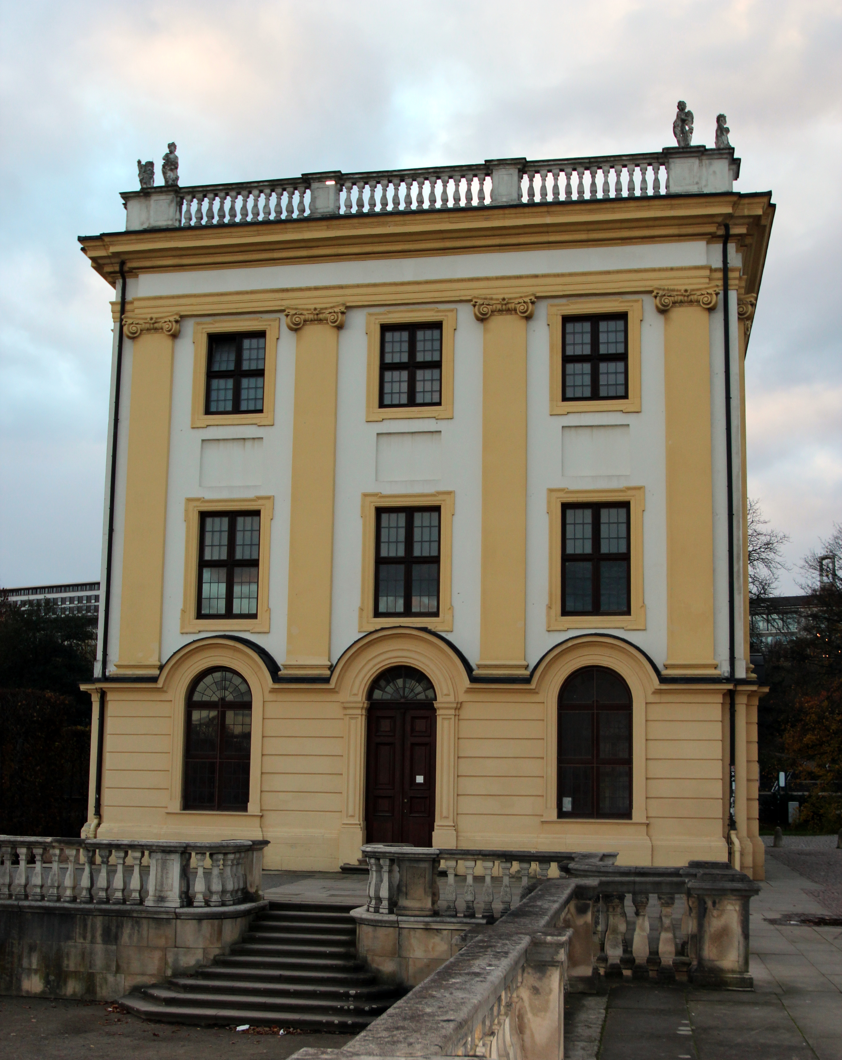 Marmorbad An der Karlsaue 20 in Kassel